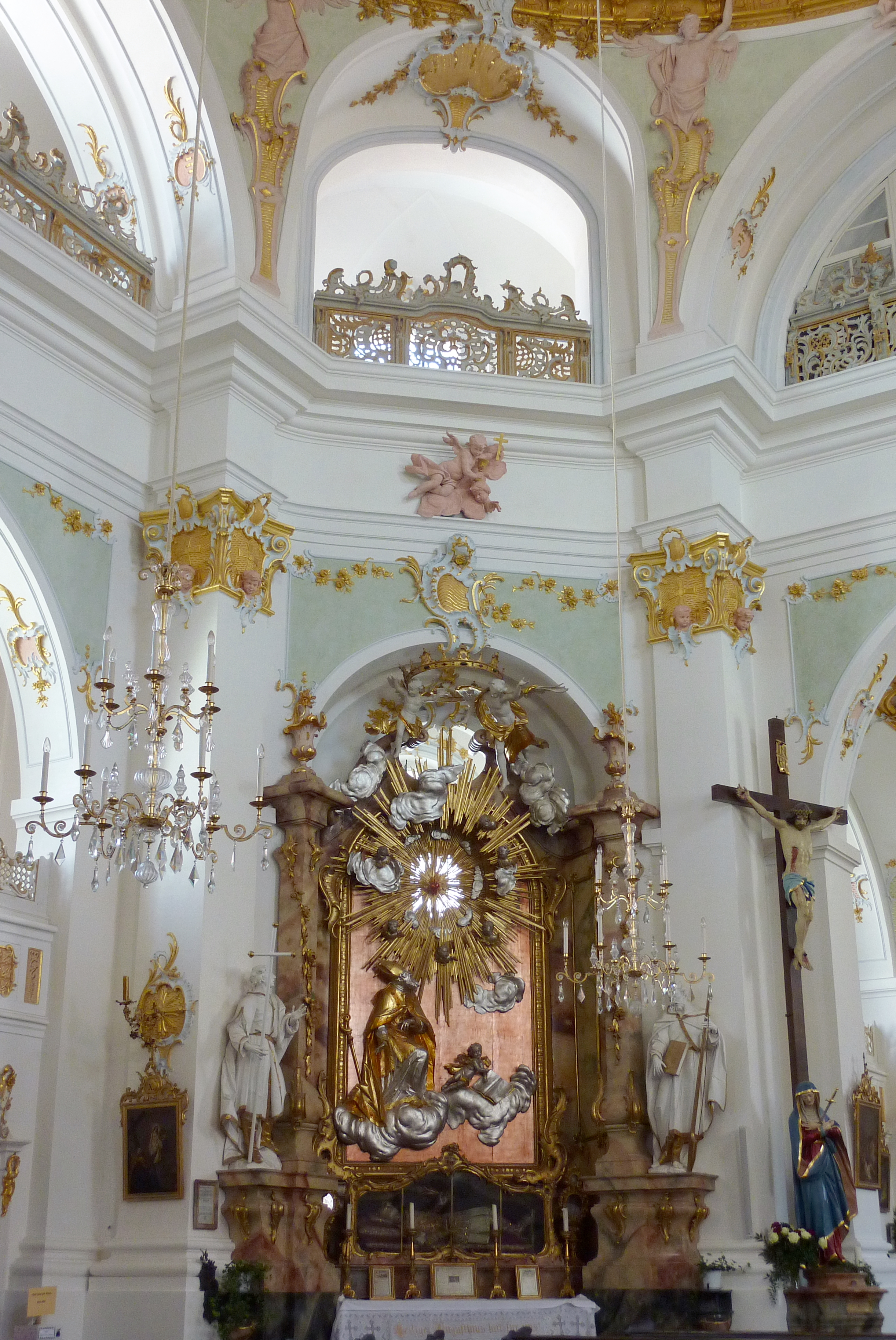 Katholische Pfarr- und Klosterkirche St. Alto und St. Birgitta in Altomünster im Landkreis Dachau (Bayern), Innenraum